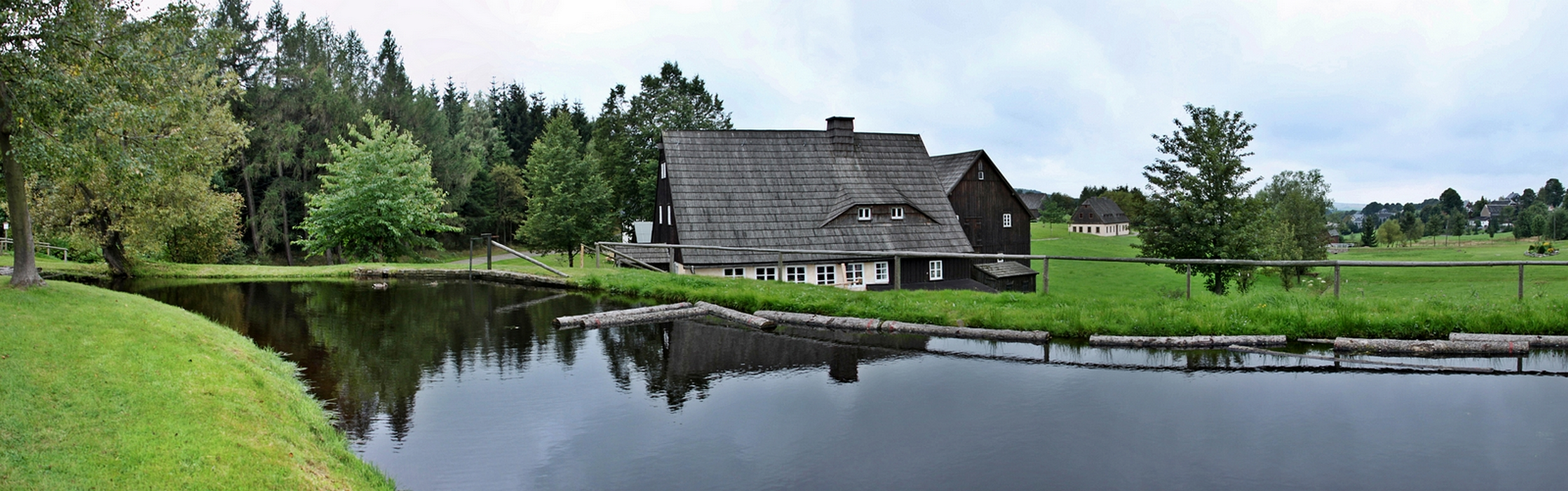 Seiffen: Blick auf das historische Wasserkraftdrehwerk ("Preißler‘sche Wasserkraft-Drehwerk") im Erzgebirgischen Freilichtmuseum. Das 1758/60 erbaute Gebäude ist das älteste original erhaltene Drehwerk in Seiffen. Das Anwesen beherbergt seit über 100 Jahren das Handwerk des Reifendrehens.